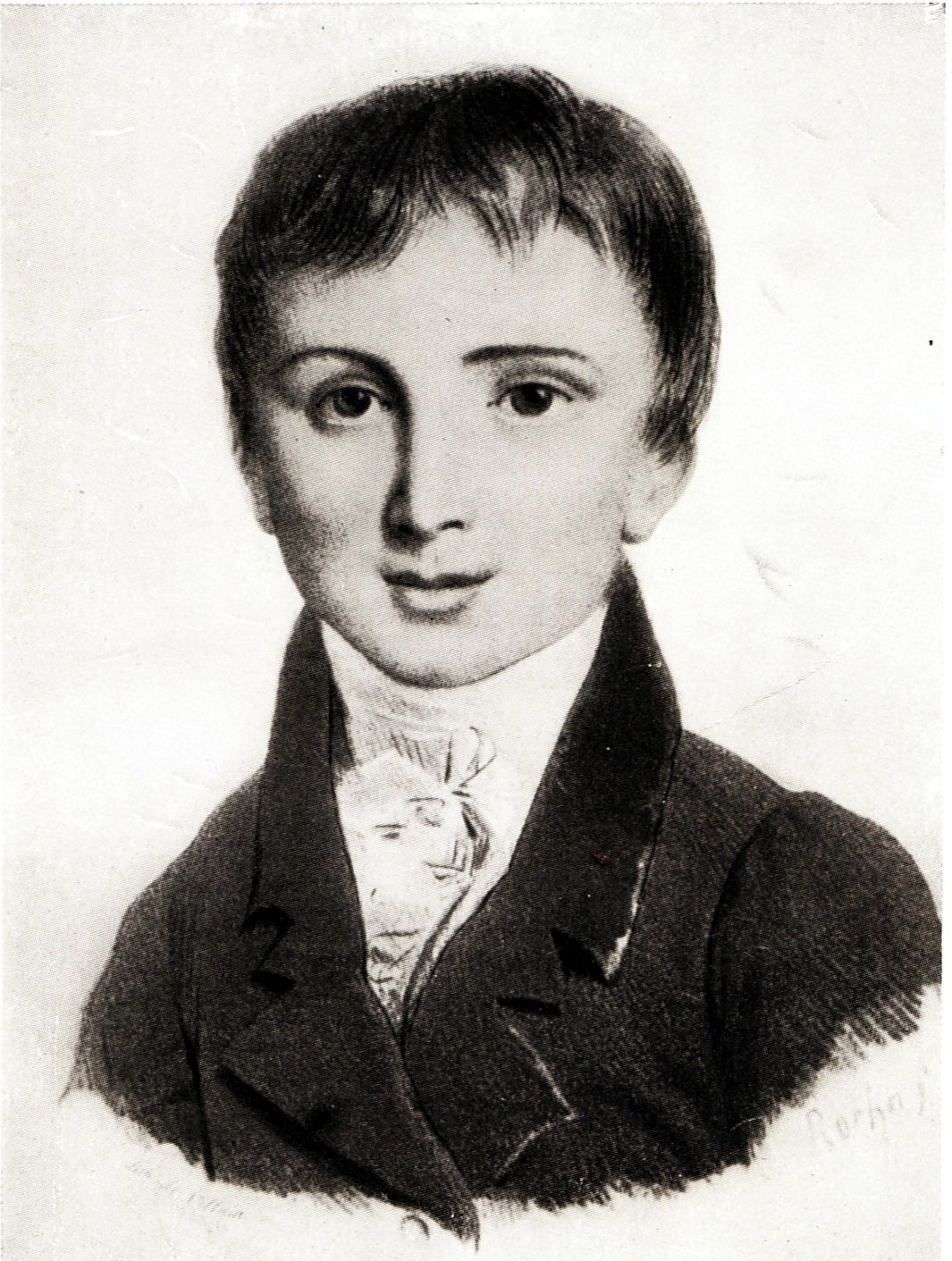 hu/Liszt Ferenc fiatalkori portréja. Villain (Gérard René Villain vagy François le Villain litográfiája) Roehn rajza alapján